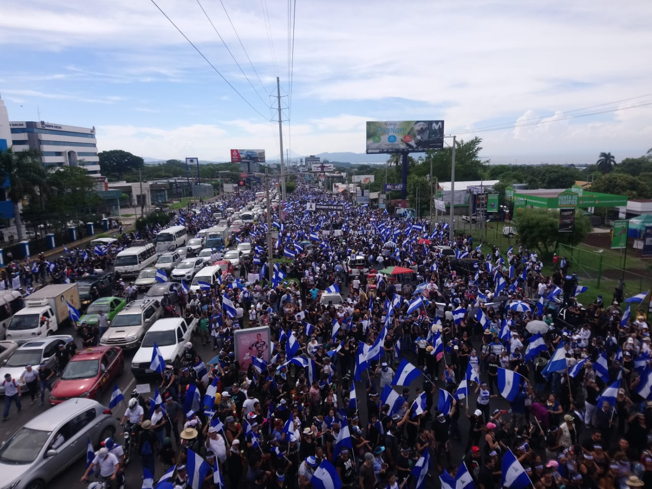 Protesta en Managua najo el lema "Juntos somos un volcán, 12 de julio de 2018"